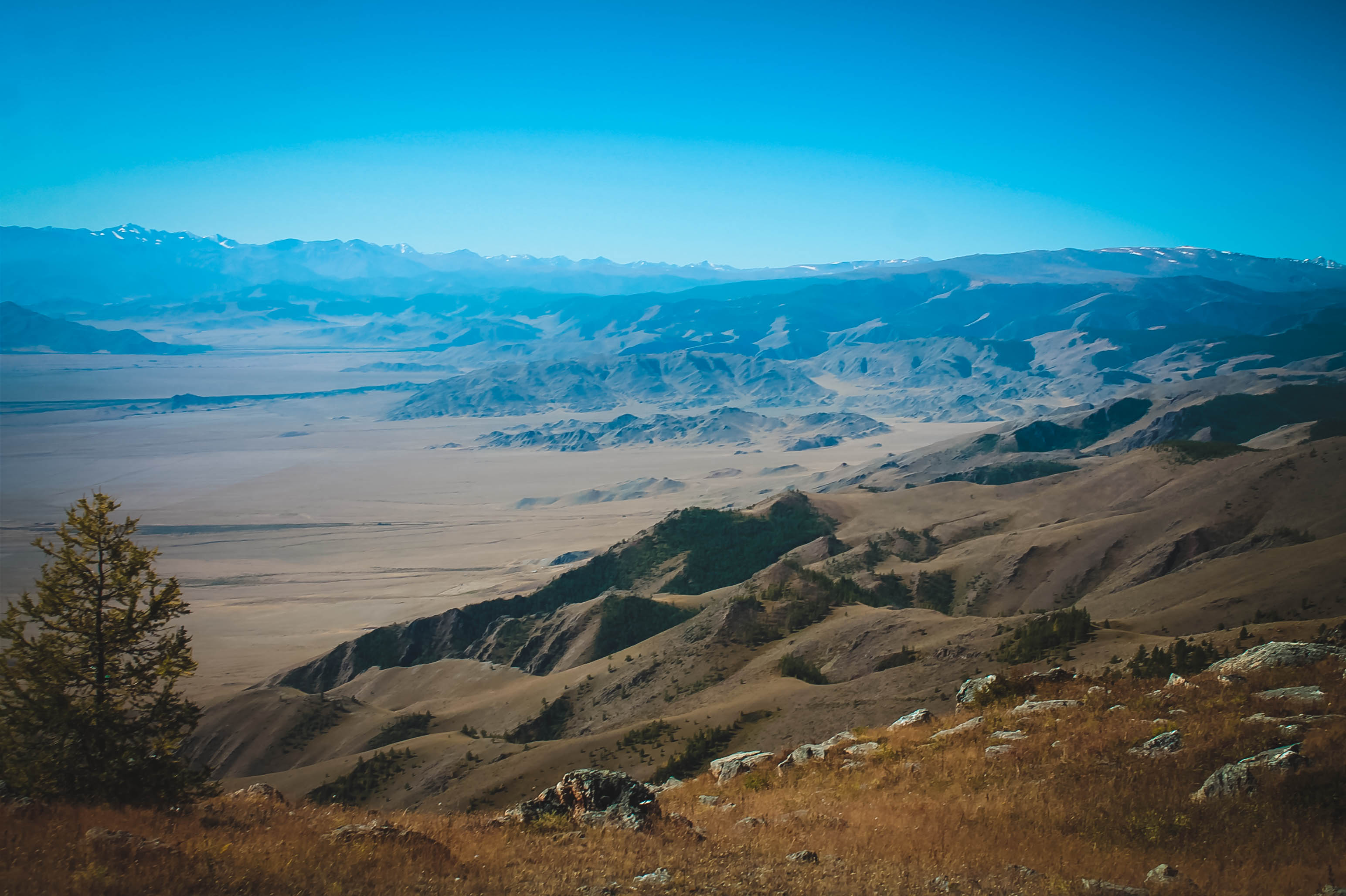 Верхушка тайги Сарыг-Хая